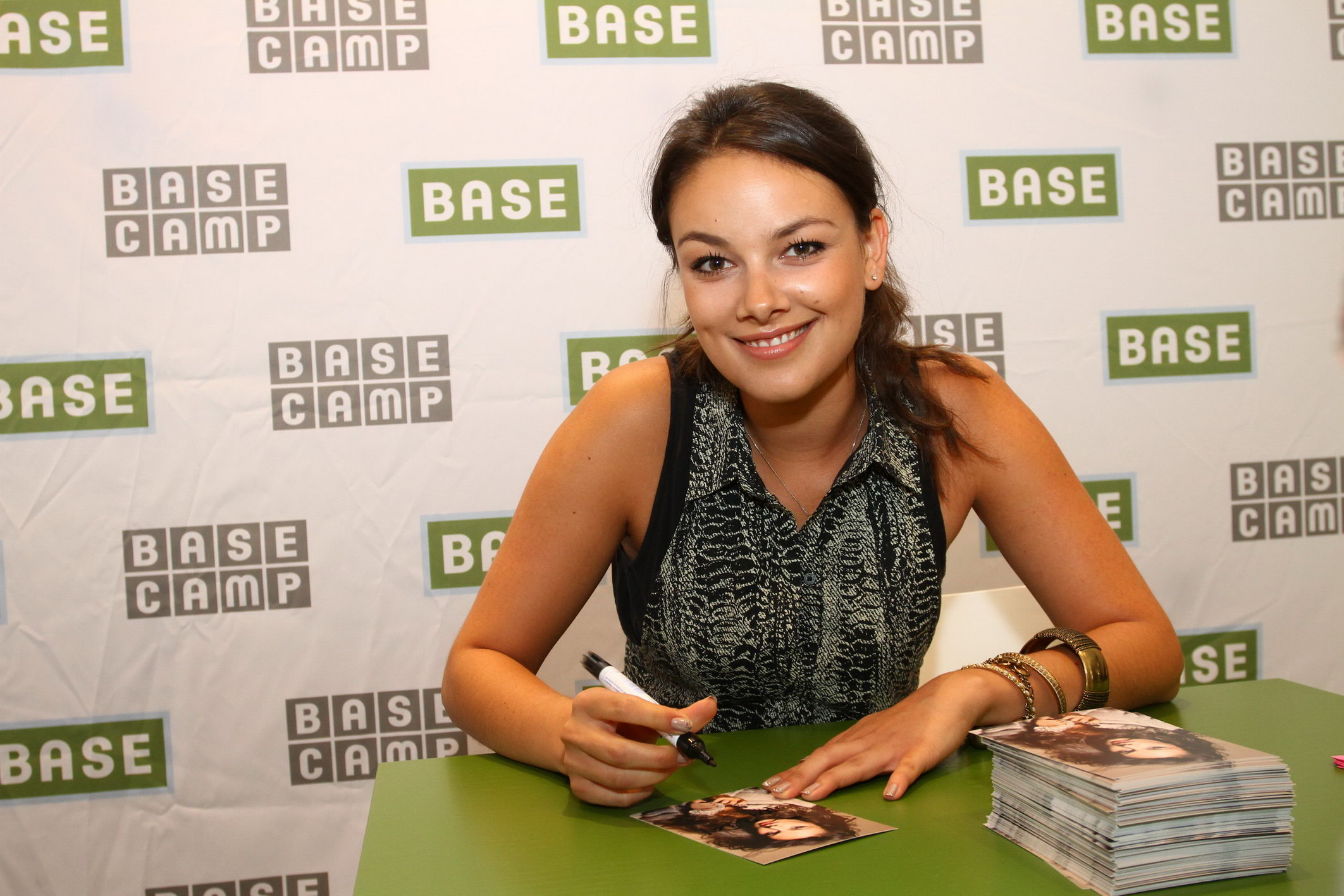 Autogrammstunde BASE Camp mit Janina Uhse